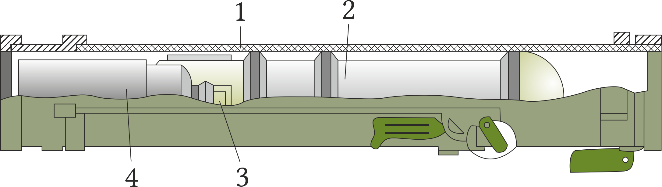 Конструкція РПВ-А